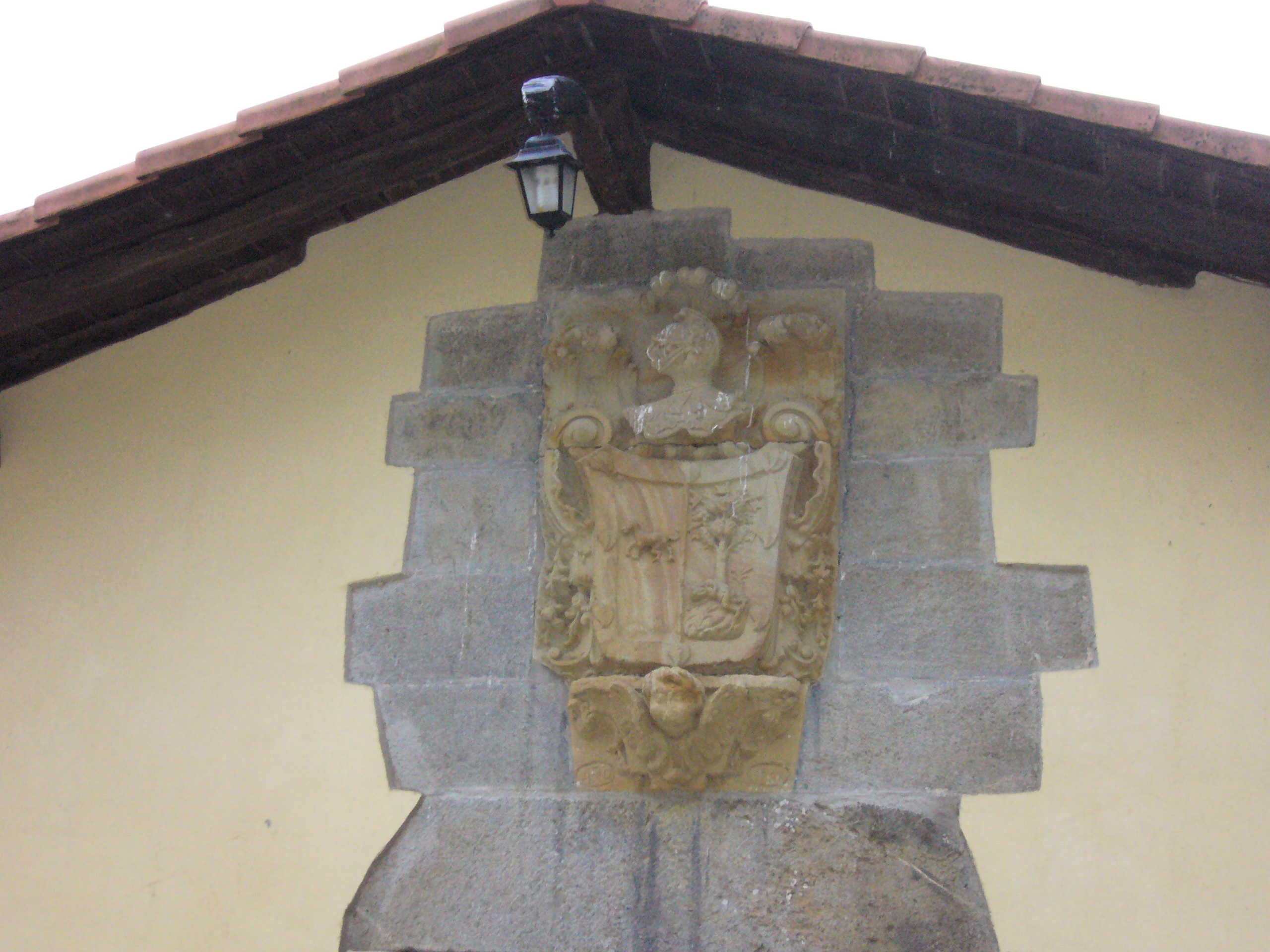 Aizpitarte baserriaren armarria